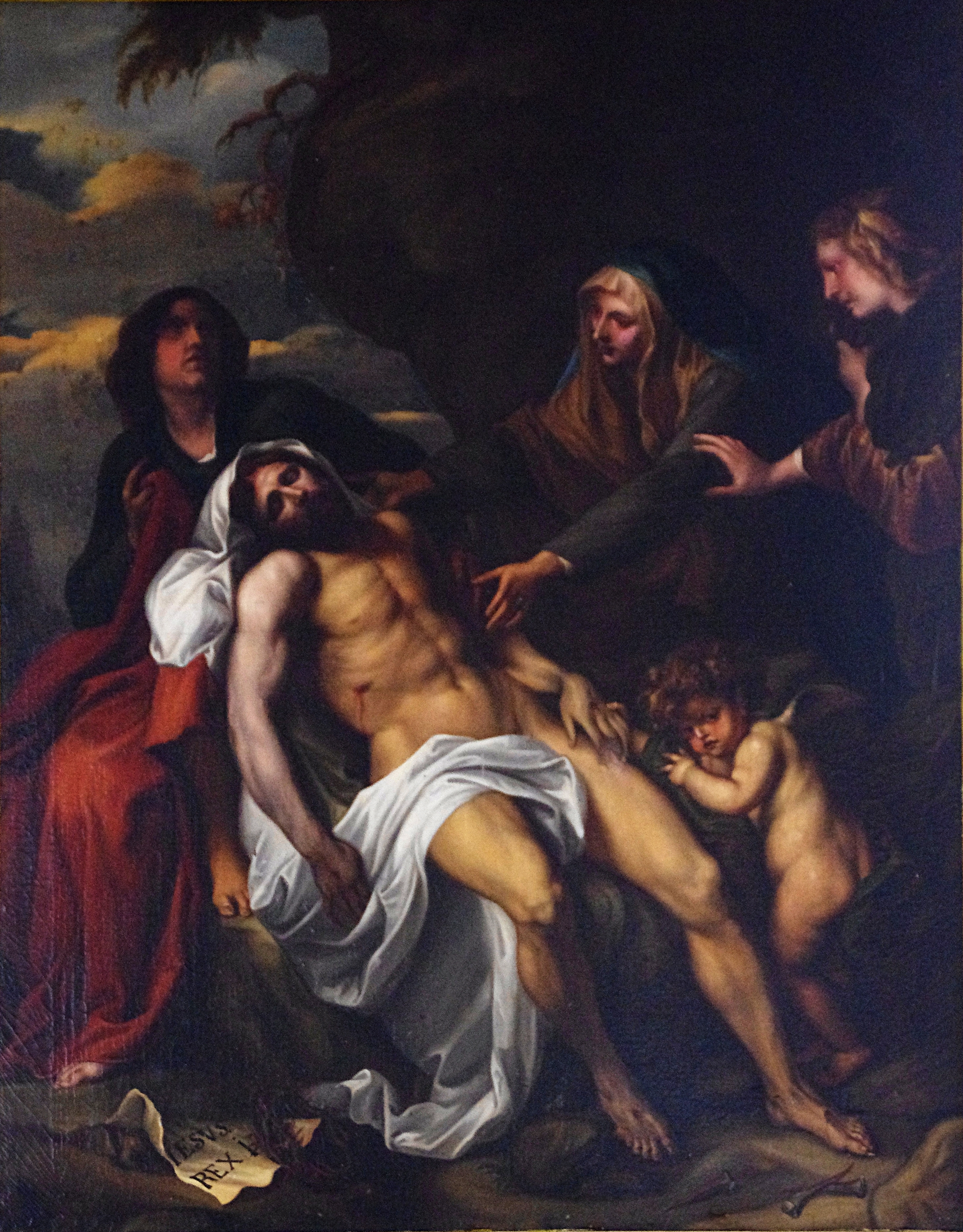 Neustadt-Glewe in Mecklenburg-Vorpommern. Das Bild die Beweinung Christi hängt an der Südwand der Marienkirche. Gemalt hat das Bild J. H. Suhrlandt nach einem Vorbild von A. van Dyck.